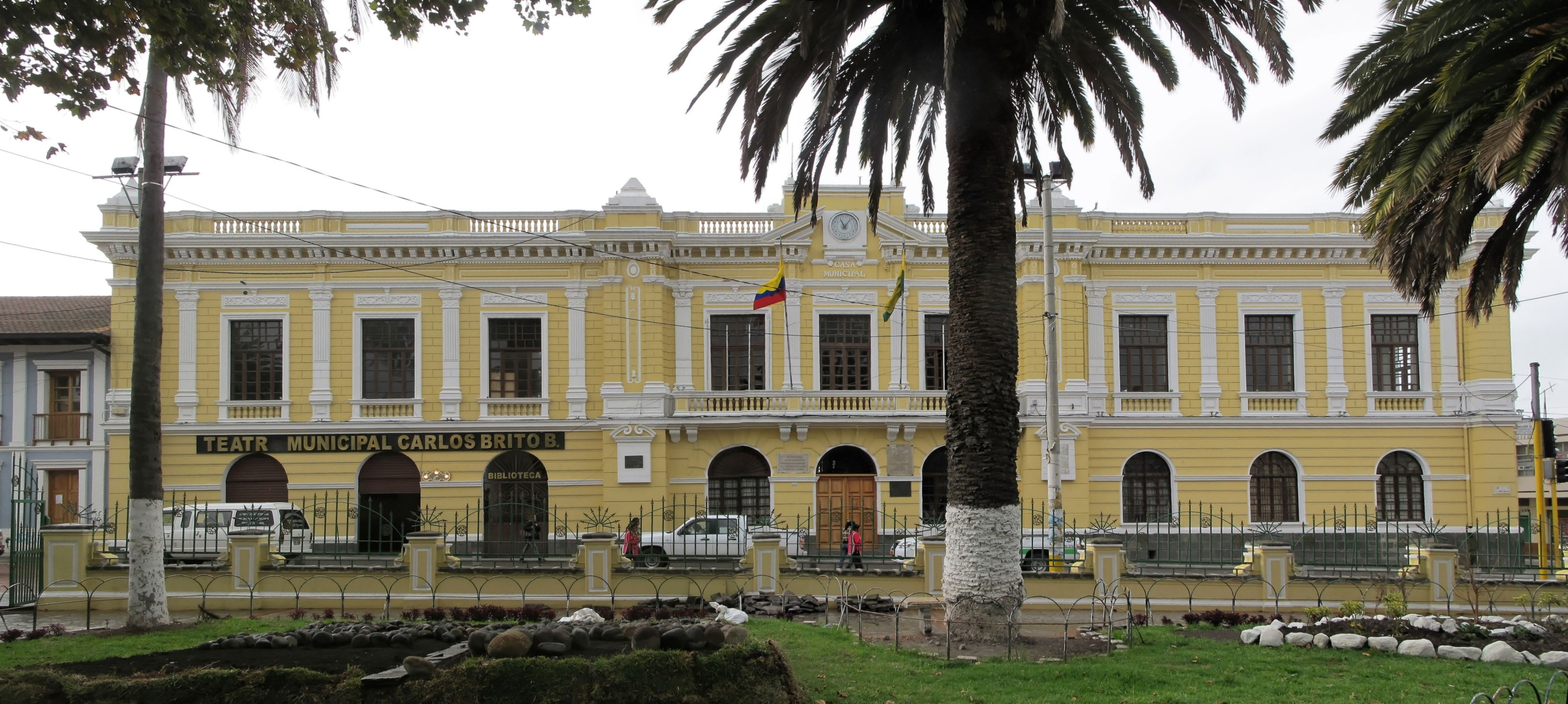 Machachi, Teatro Municipal